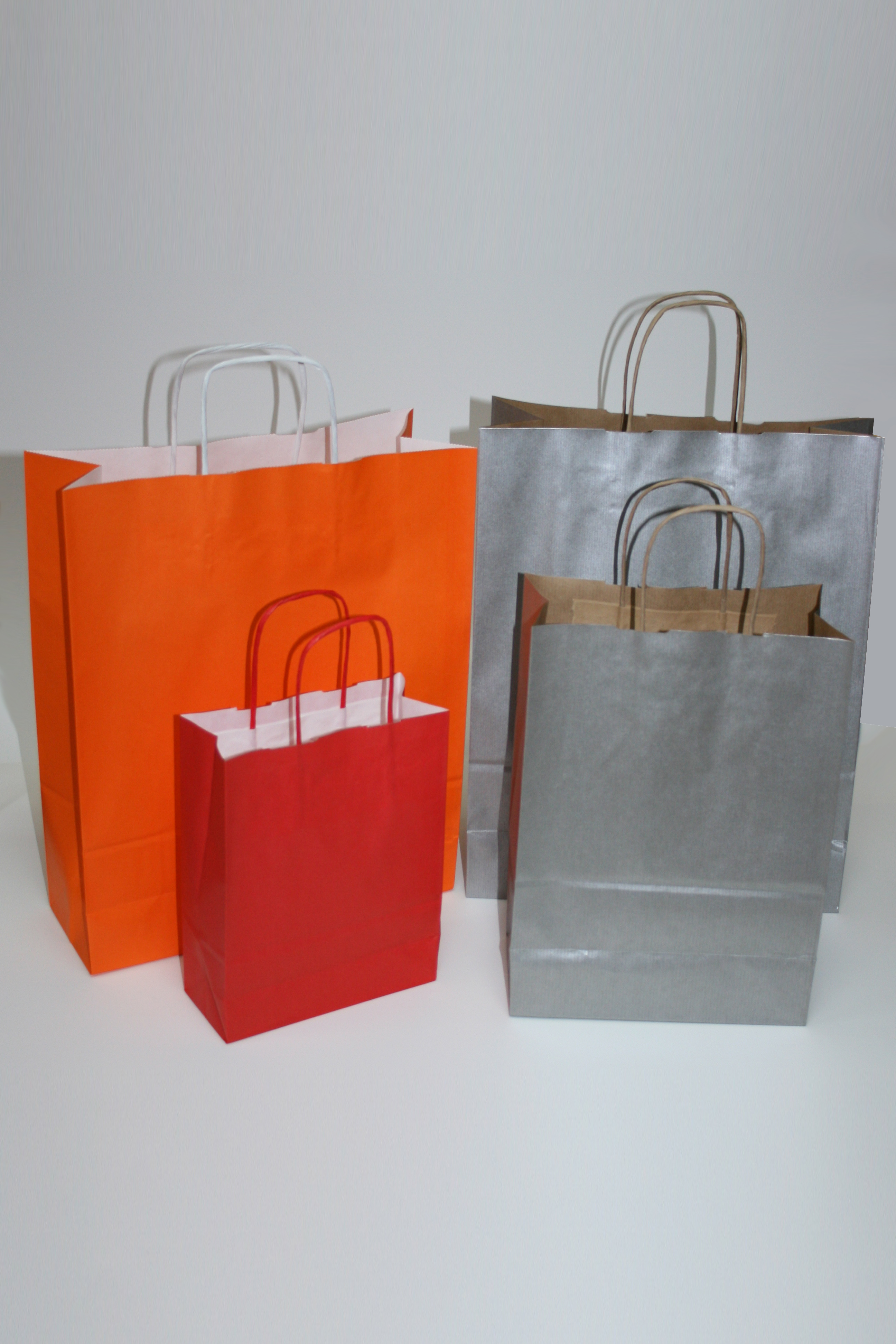 Bolsas de papel con asa rizada o retorcida